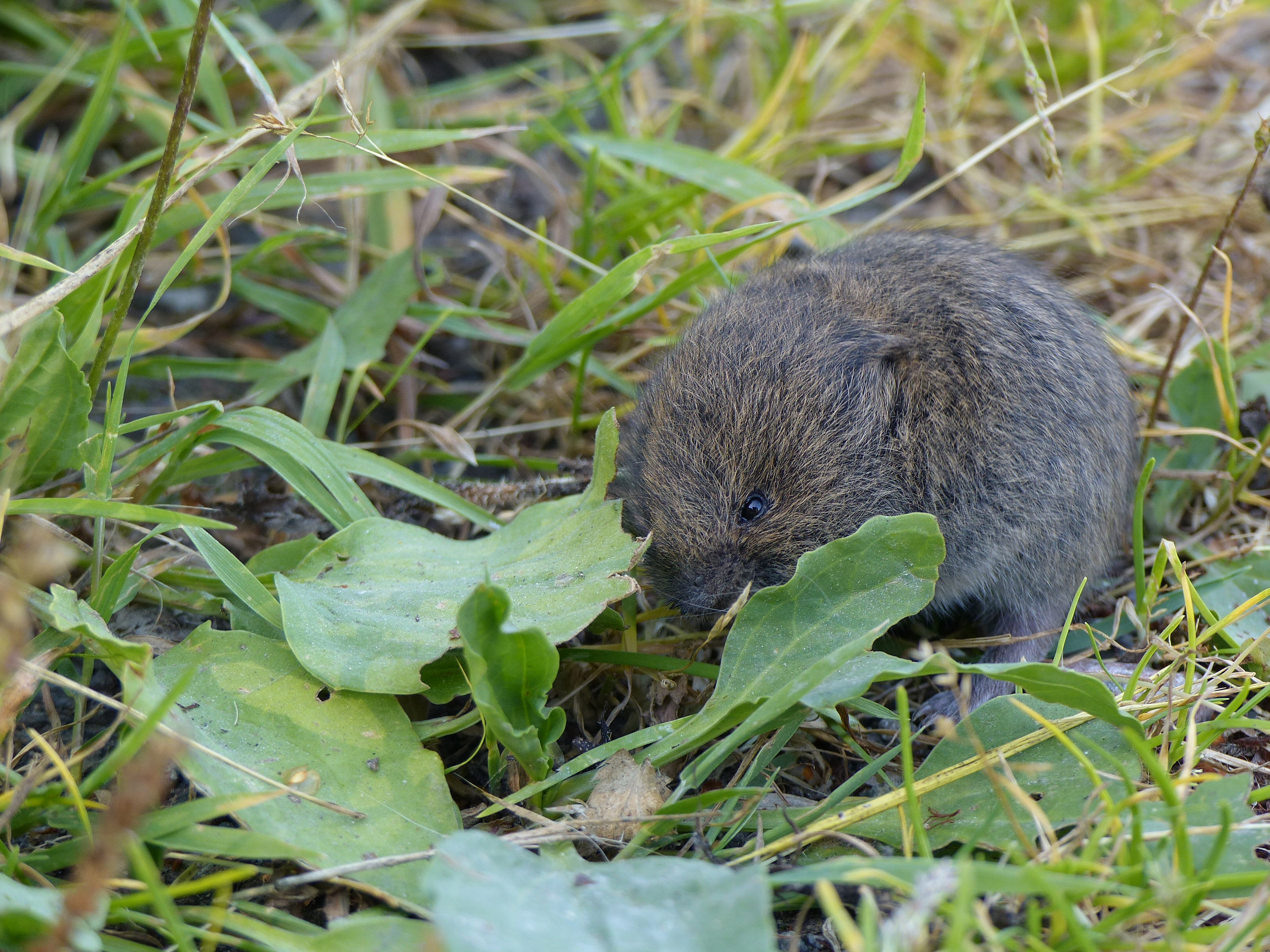 Vattensork äter växt